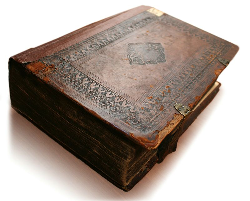 Острозька Біблія в колекції музею